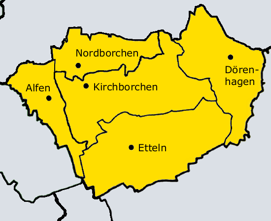 Ortsteile der Gemeinde Borchen